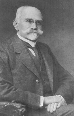 Dr. Albert Schädler (1848–1922), Präsident des liechtensteinischen Landtags